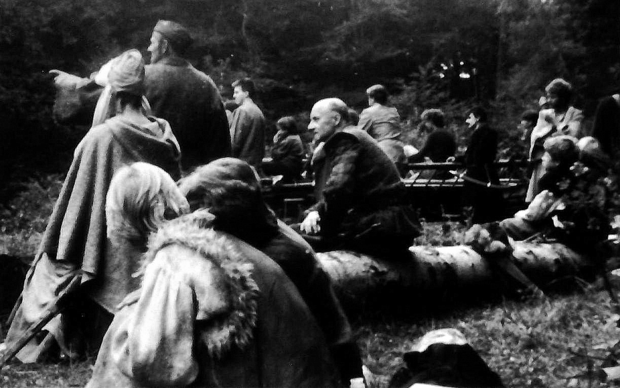 Marek Walczewski (Mitte) während der Dreharbeiten an Crimen in Gruszka n. Lesko